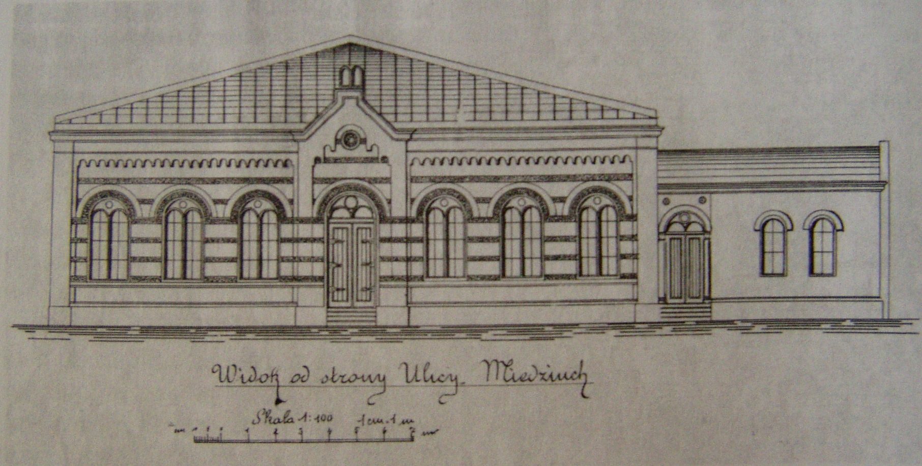 Projekt synagogi Bne Emuna w Krakowie, 1866